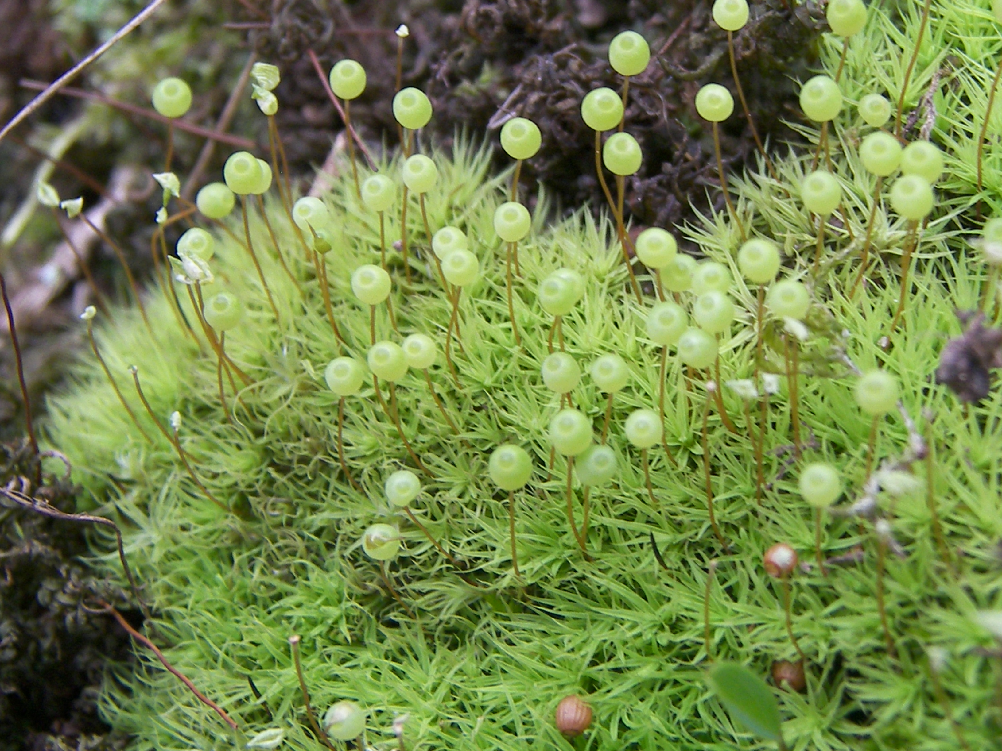 Brno Přehrada , PR Břenčák, Bartramia pomiformis